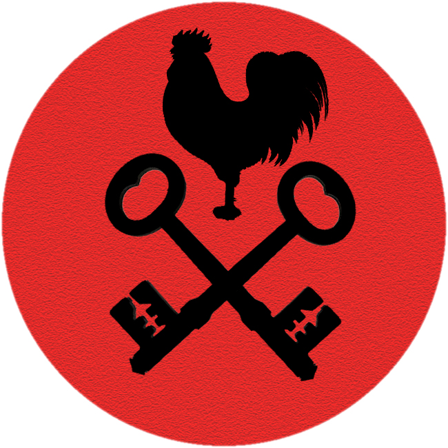 Simblos tradicionales de San pedro